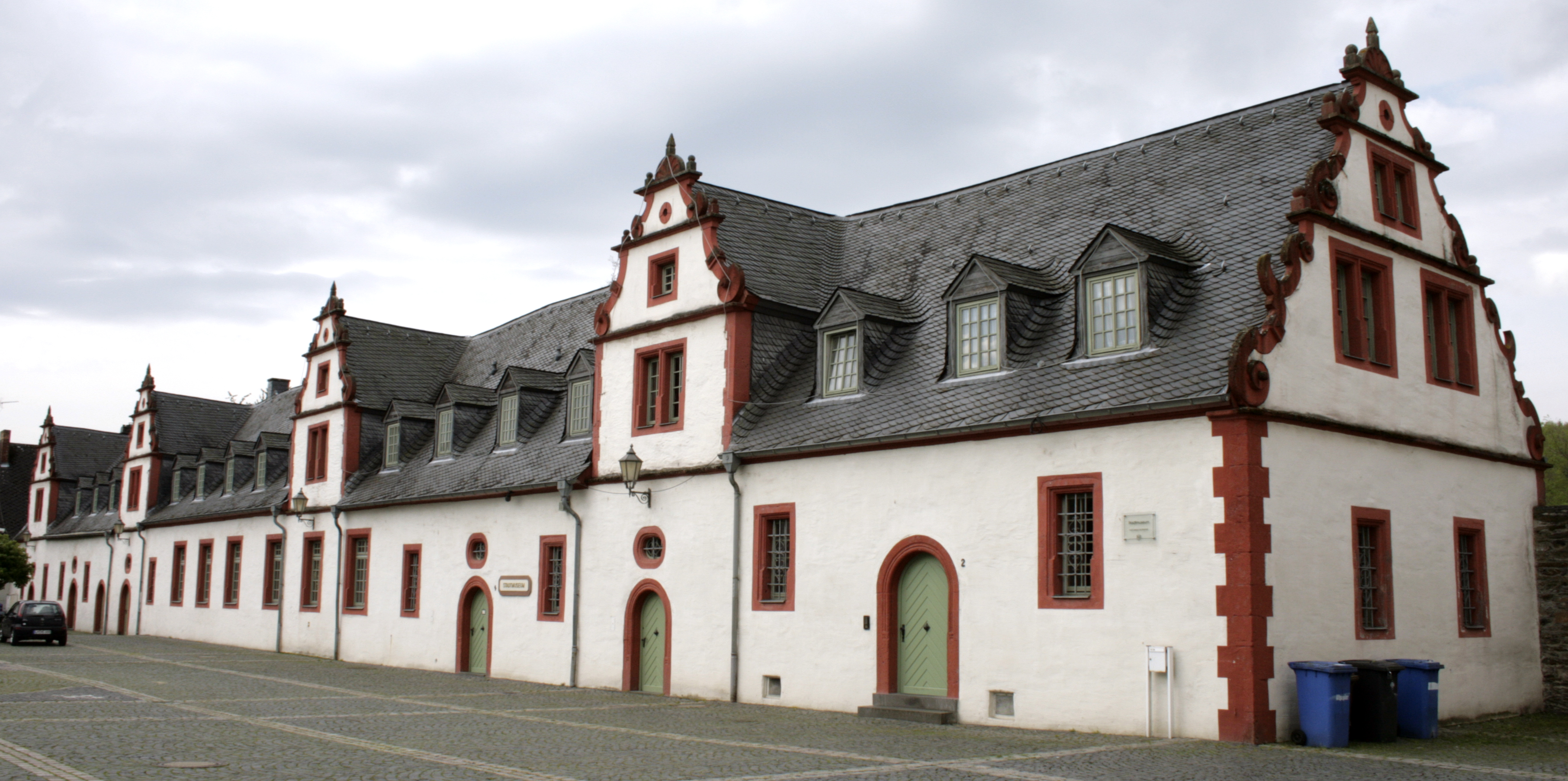 Schloss Hadamar, ehemaliger Wirtschaftshof, heute Stadtmuseum, Deutschland